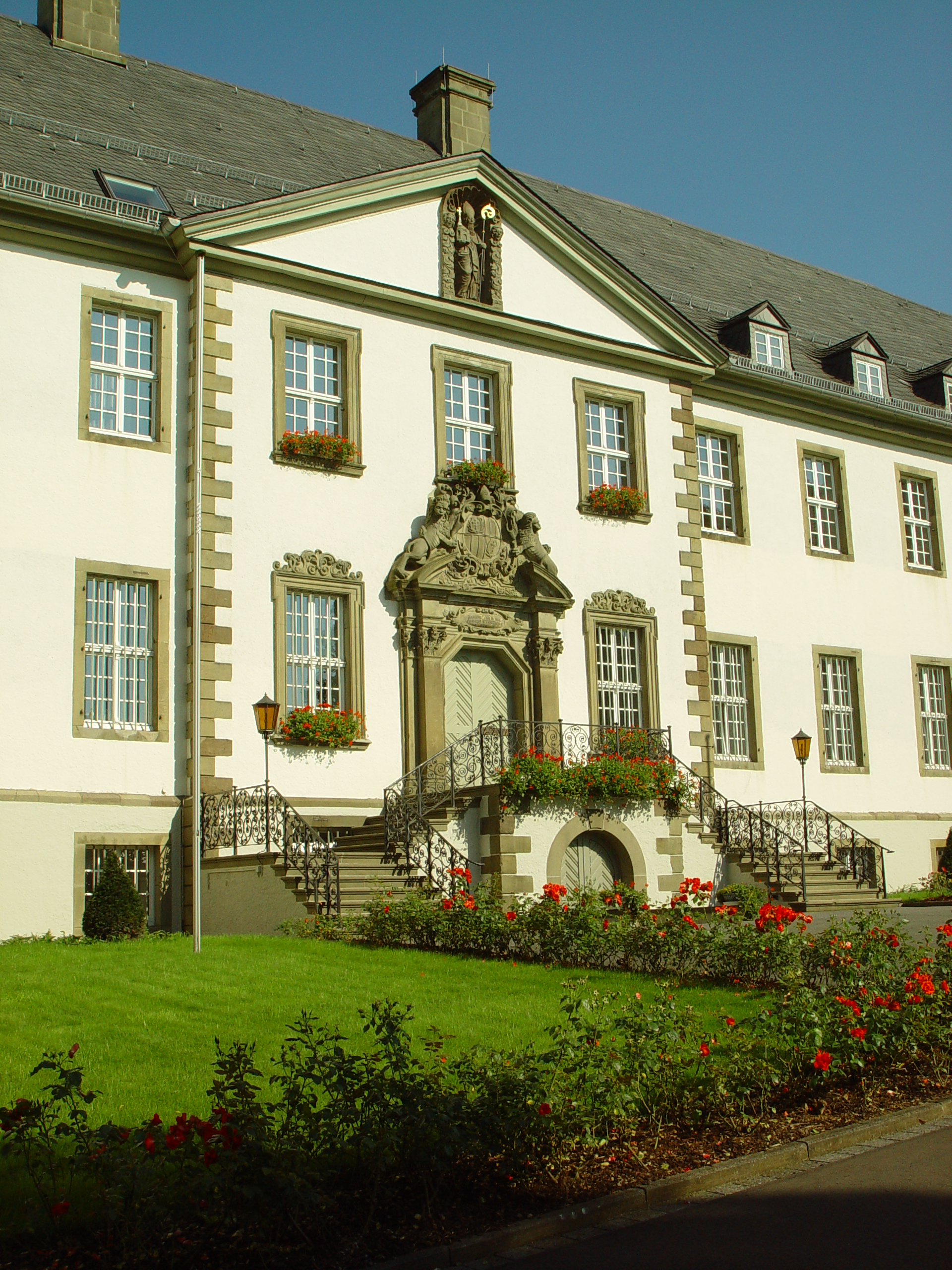 Mutterhaus Kloster Grafschaft